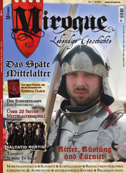 Titel der aktuellen Ausgabe: Das späte Mittelalter